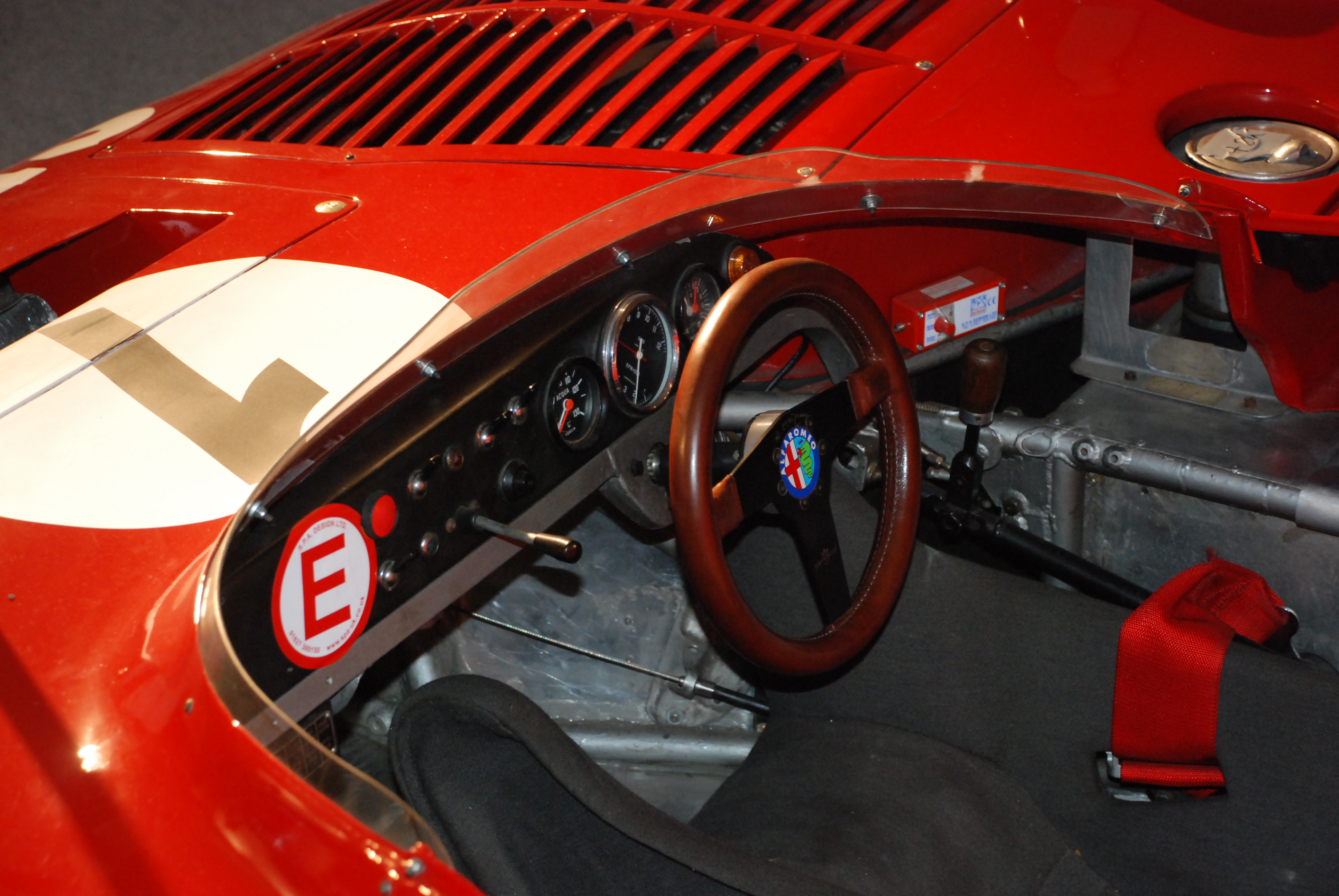 Cockpit des Alfa Romeo Tipo 33